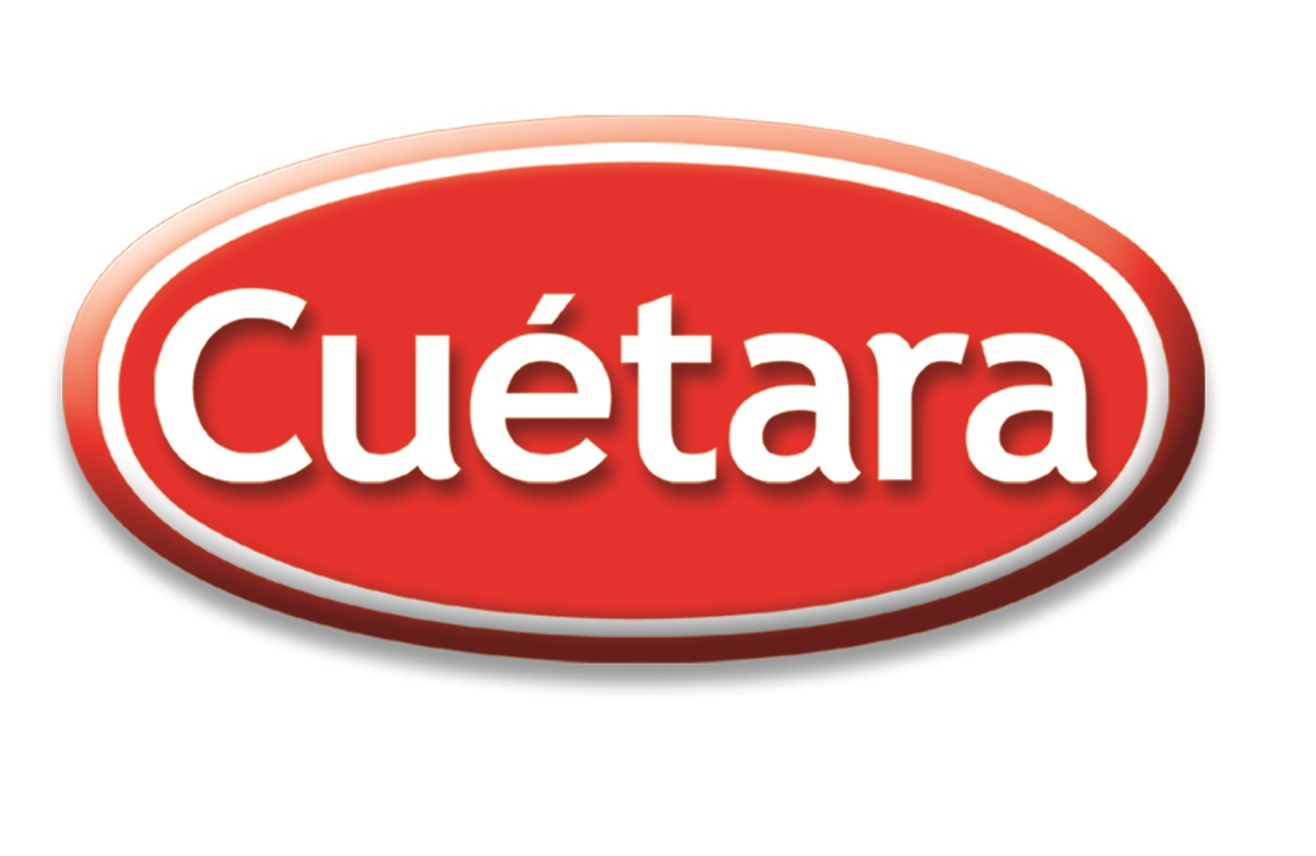 Logotipo de la marca española de galletas Cuétara